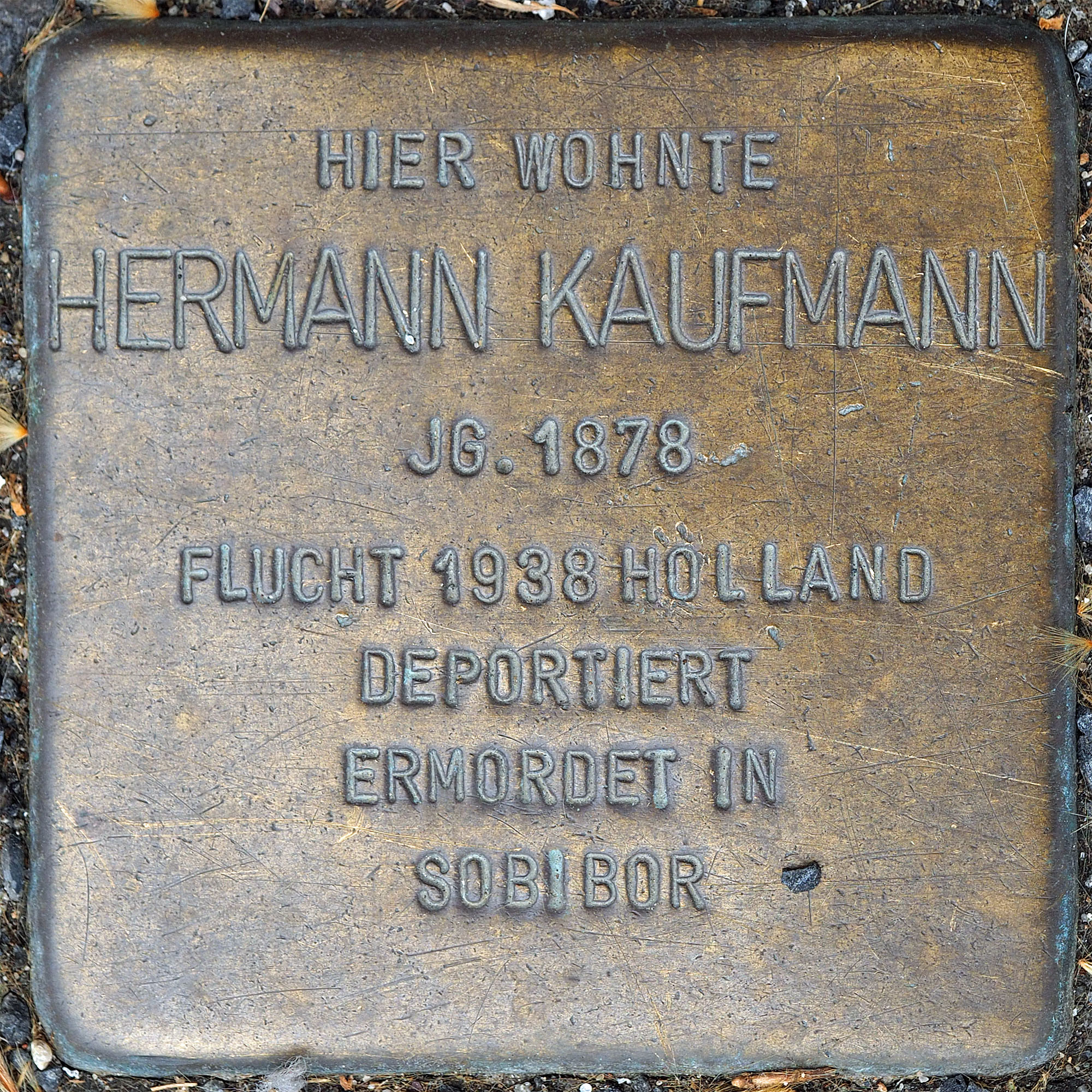 Stolpersteine MG: Kaufmann, Hermann